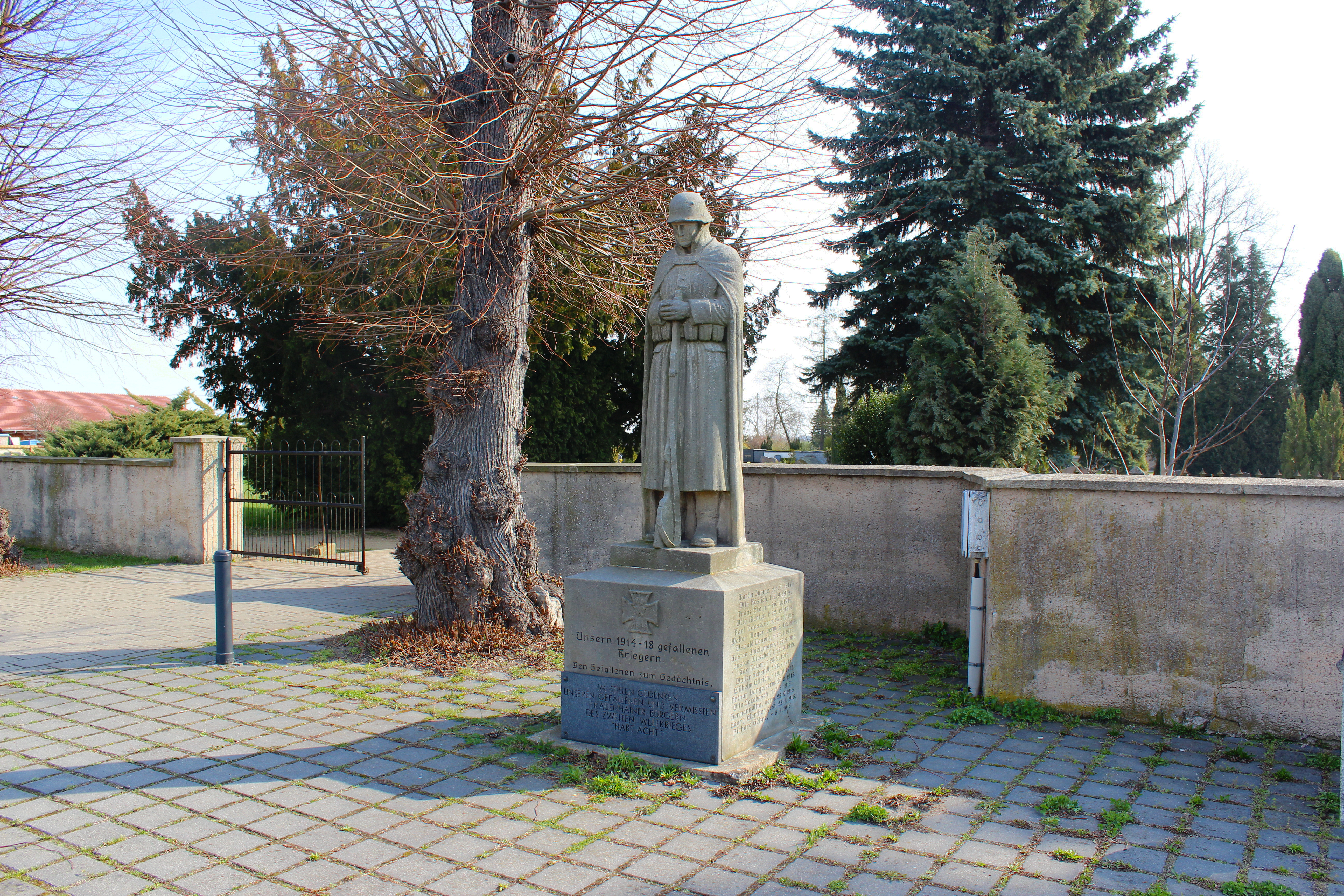 Frauenhain (Röderaue) Kriegerdenkmal.